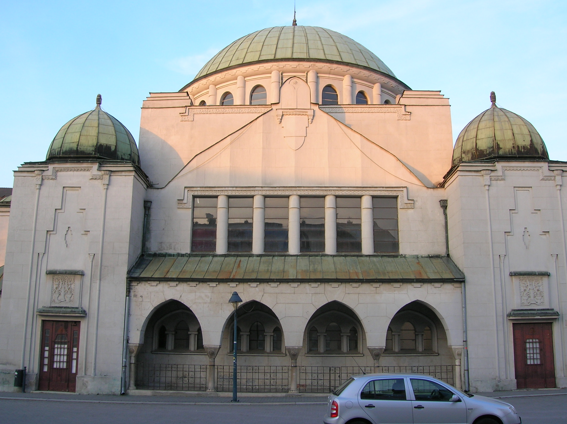 synagóga - pohľad zboku, Trenčín